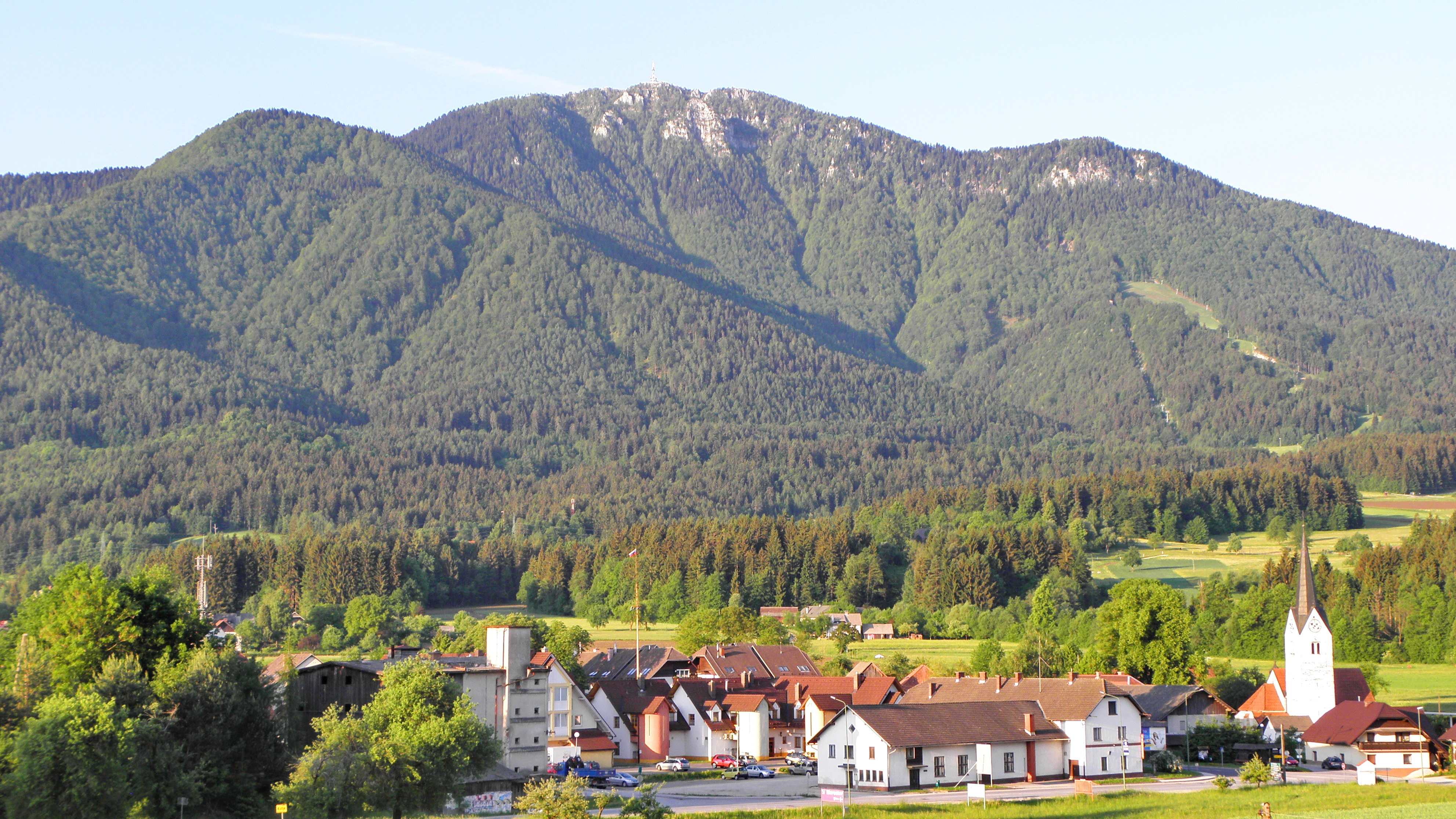 Pogled na Uršljo goro iz Kotelj